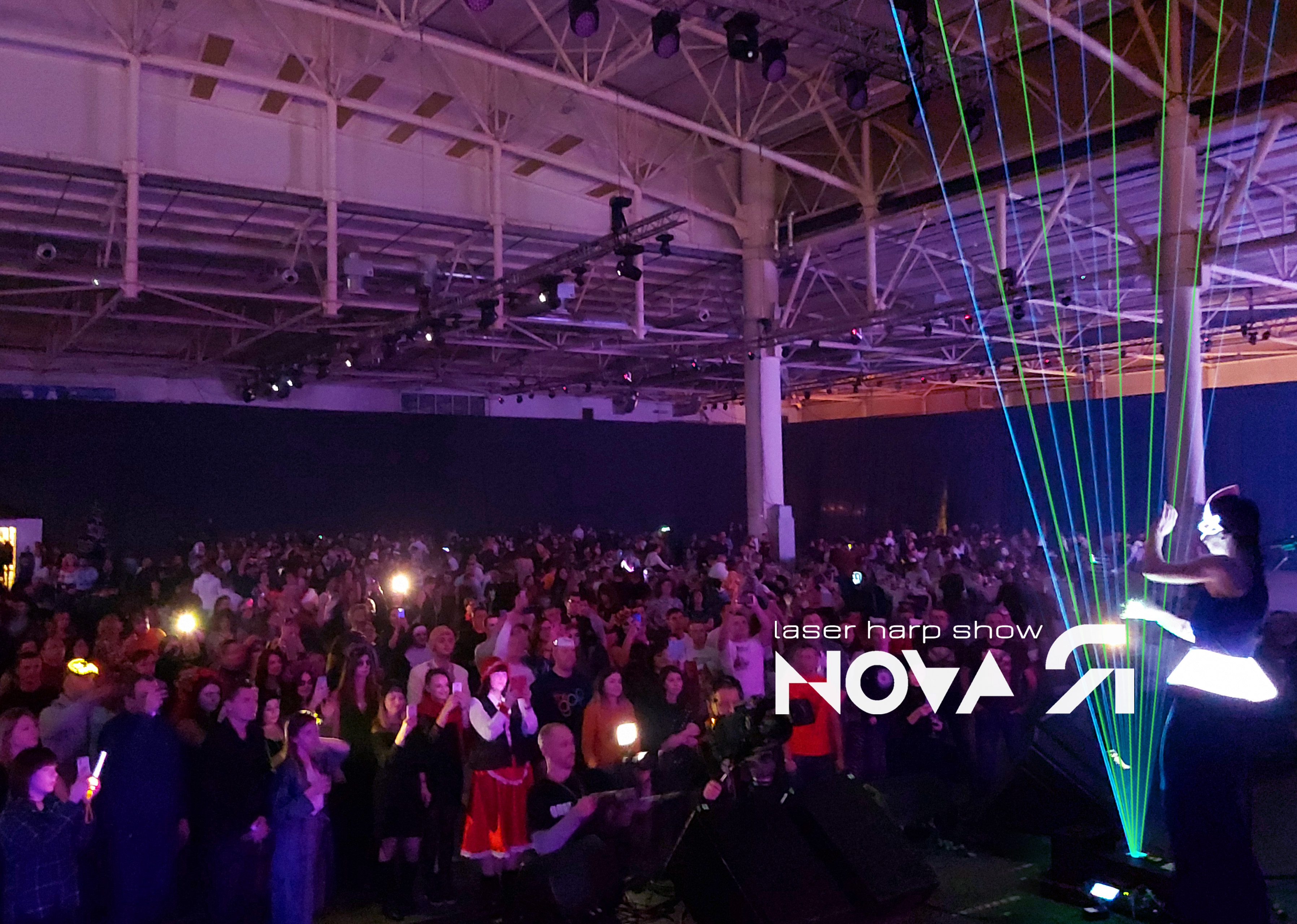 шоу лазерной арфы "новаЯ"